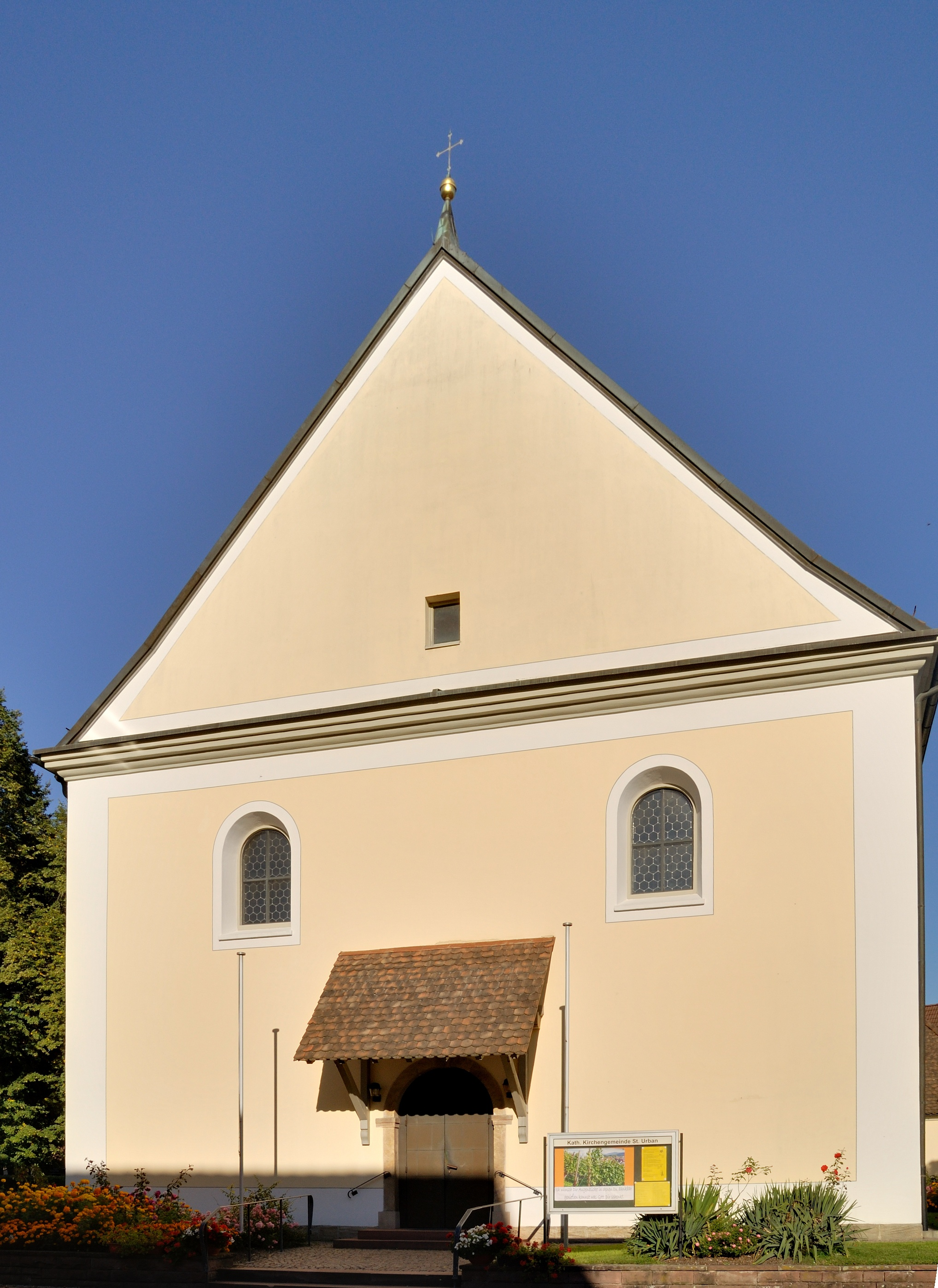 Rheinfelden-Herten: St. Urban, Westfassade mit Haupteingang